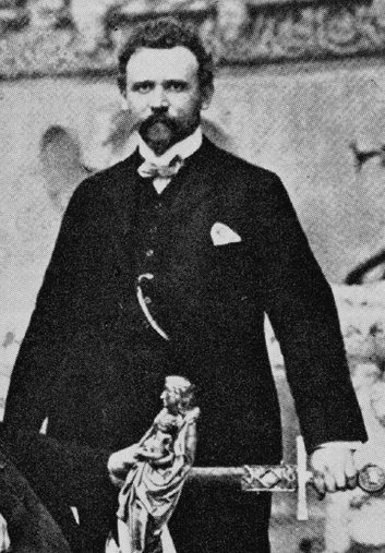 Paul Clemen